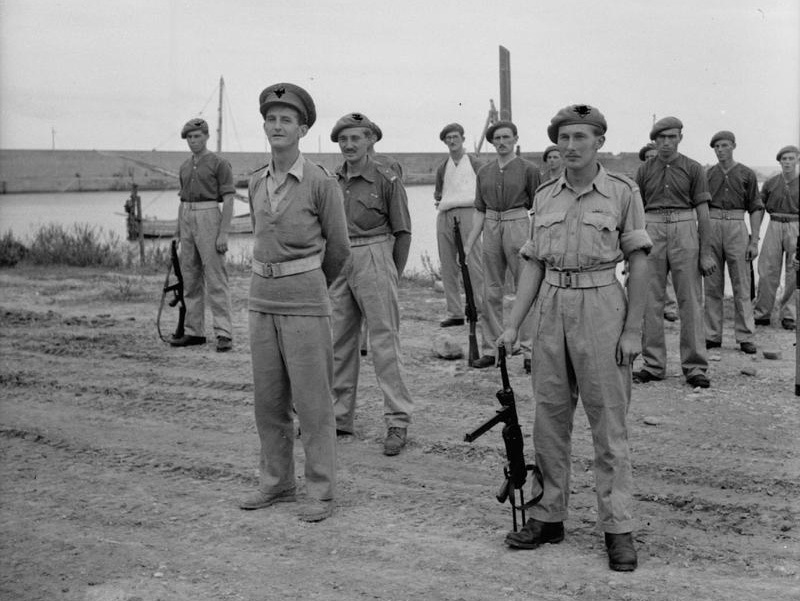 Paddy Mayne junto con los Royal Ulster Rifles.